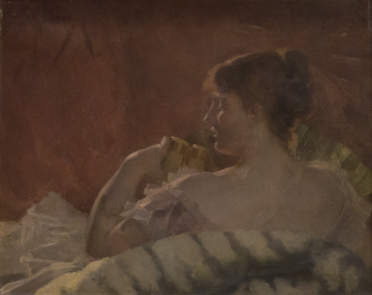 Edouard Agneessens - In het theater (1880)- Museum voor Schone Kunsten (Doornik)